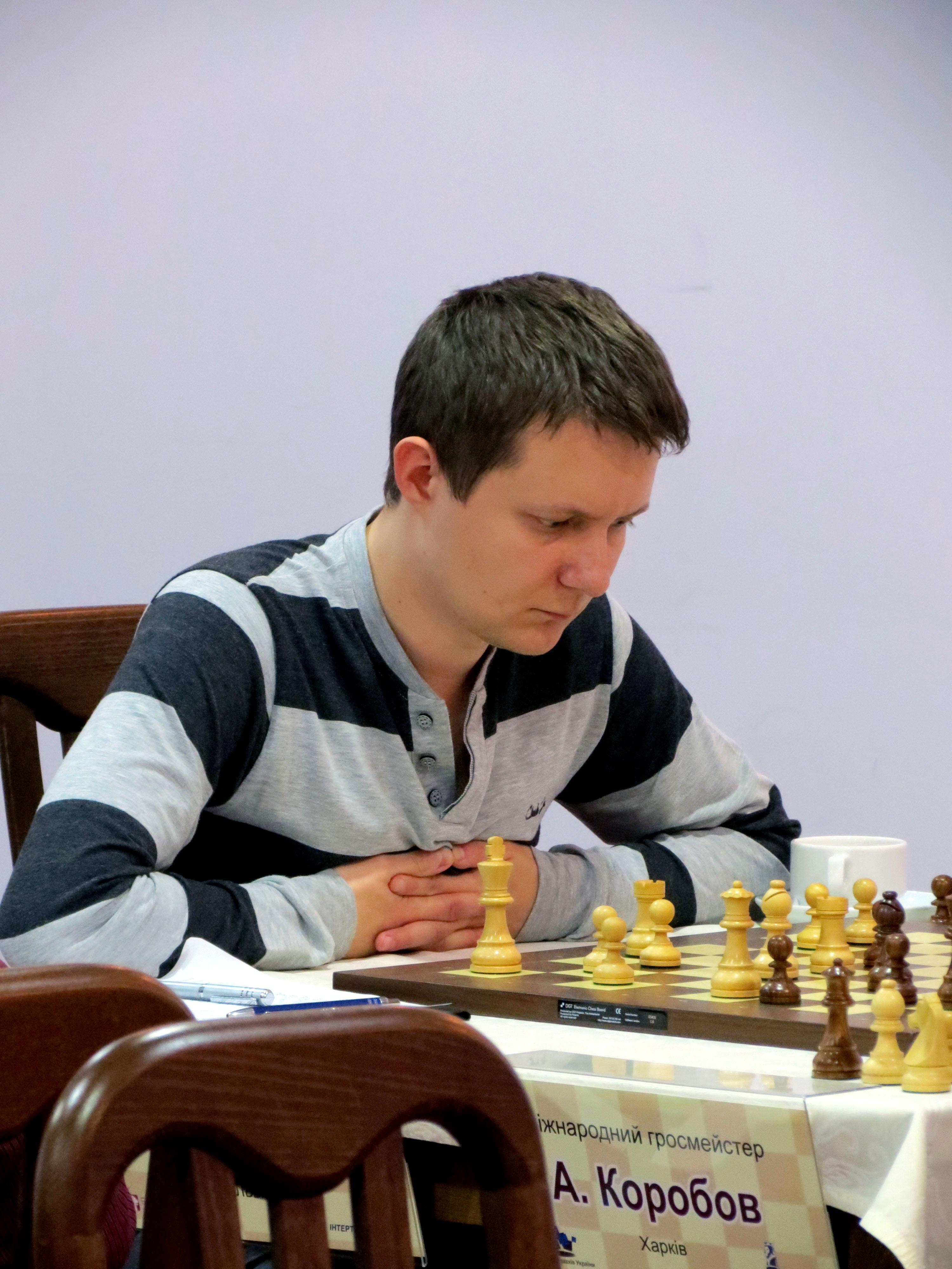 Олександр Арещенко - чемпіонат України 2014